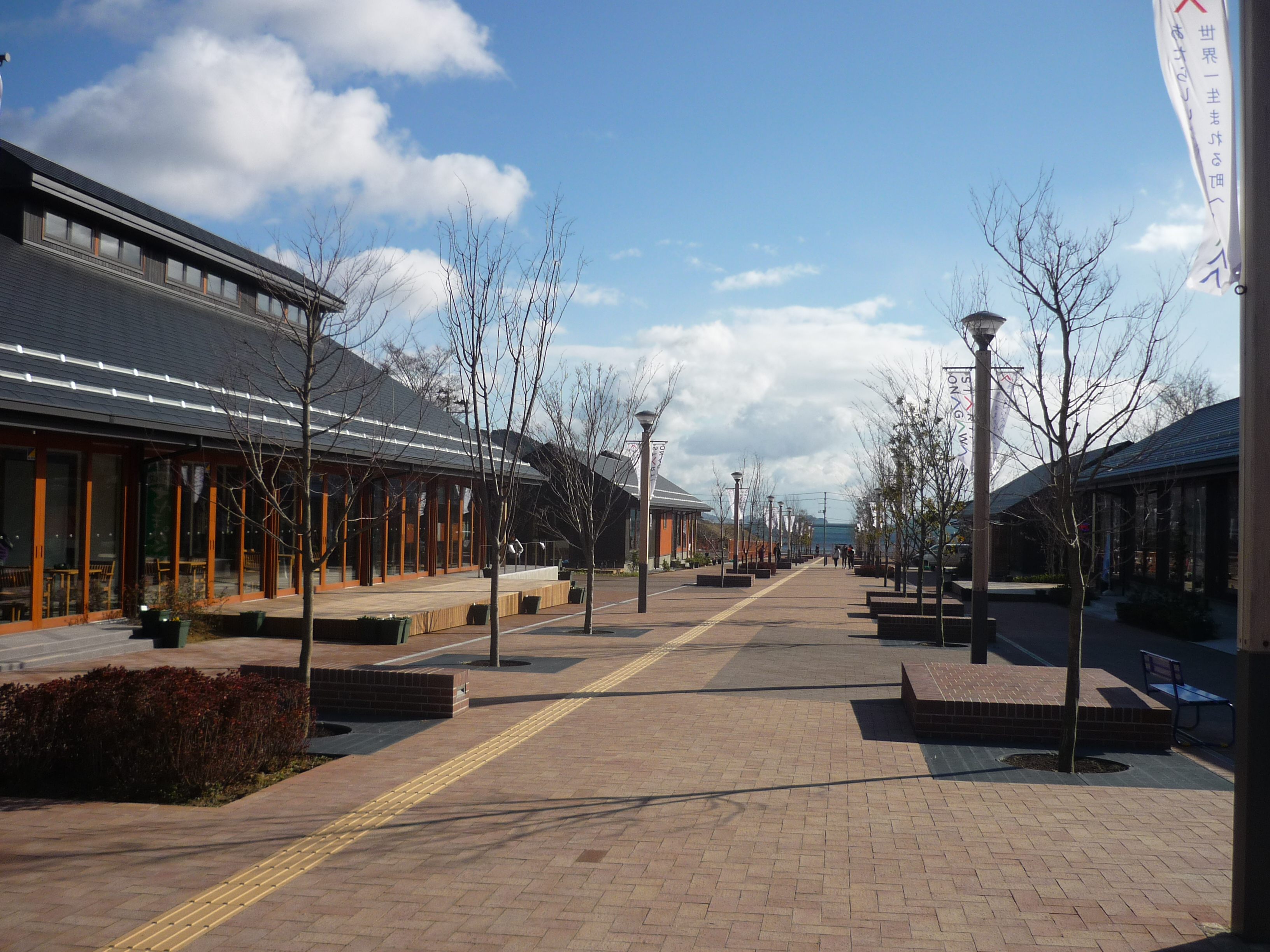 営業再開後の女川駅前に開設された商店街（2015年12月）